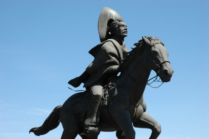 Estatua de Ignacio Pérez Álvarez, ubicada en Avenida Universidad, esquina Avenida Corregidora Norte, en Querétaro